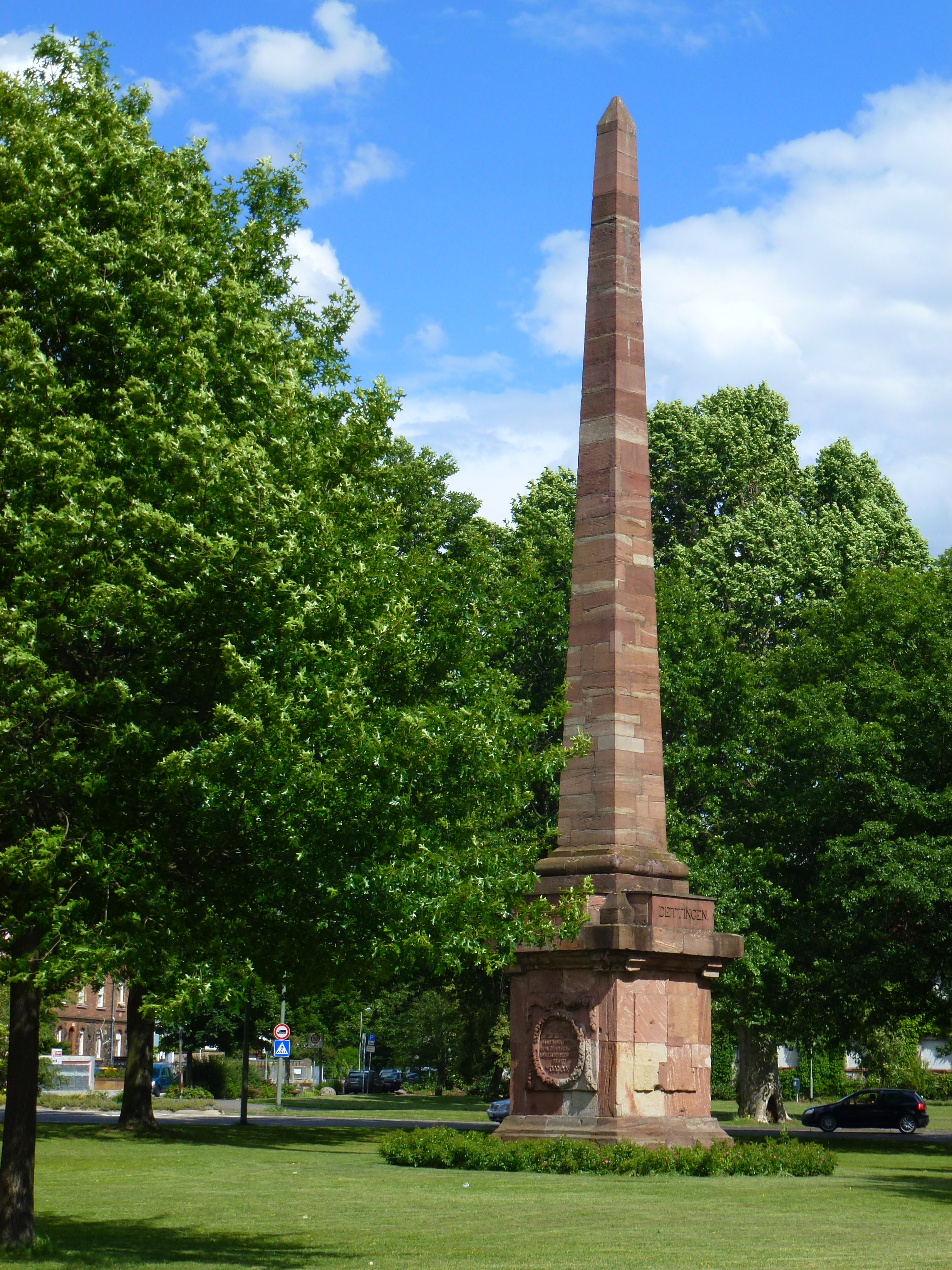 Die Ehrensäule in Hanau an der B 43 (Barbarossastraße und südlicher Zweig der Willy-Brandt-Straße)